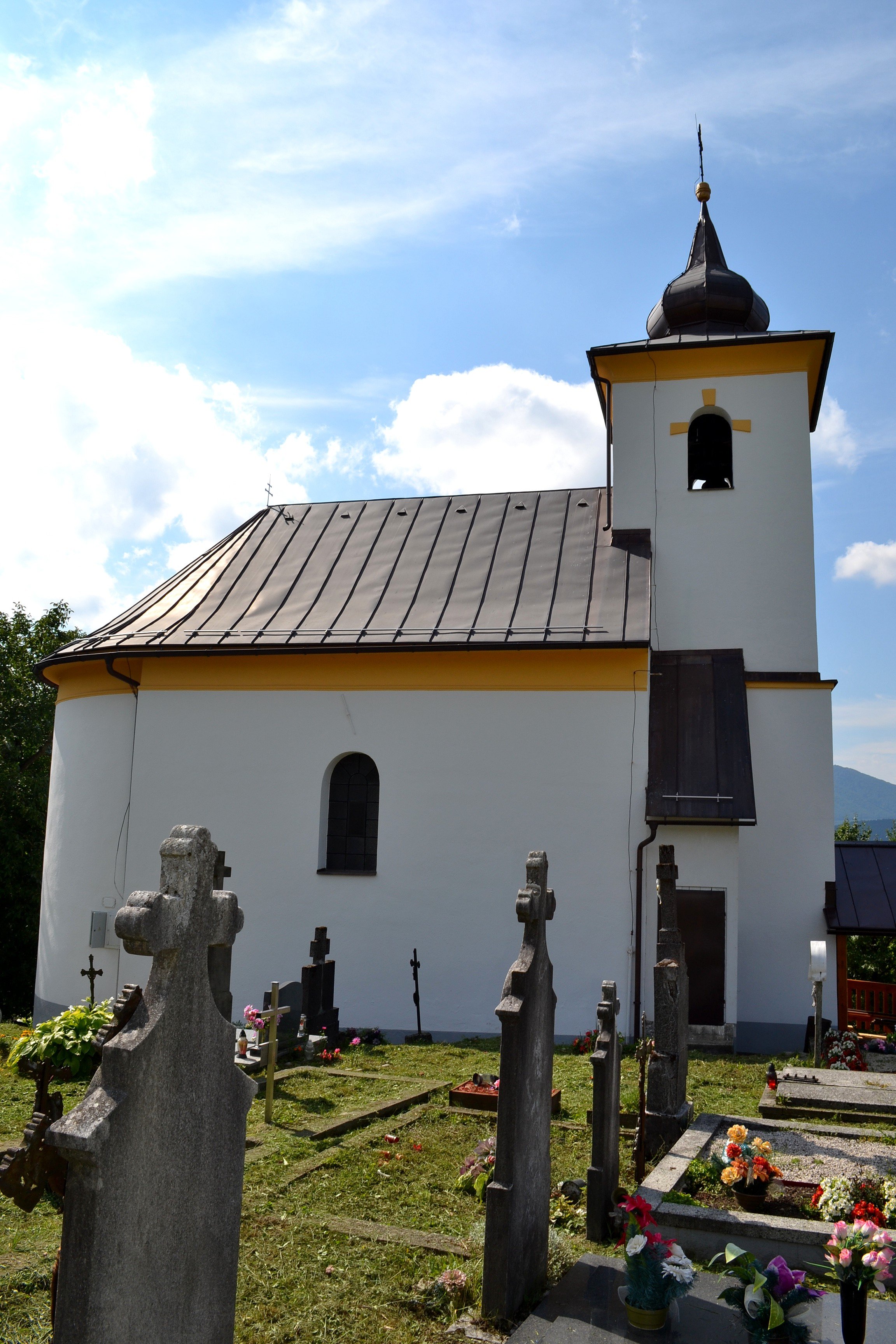 Horný Lieskov (okr. Považská Bystrica), Kostol svätého Kríža; celkový pohľad od severu